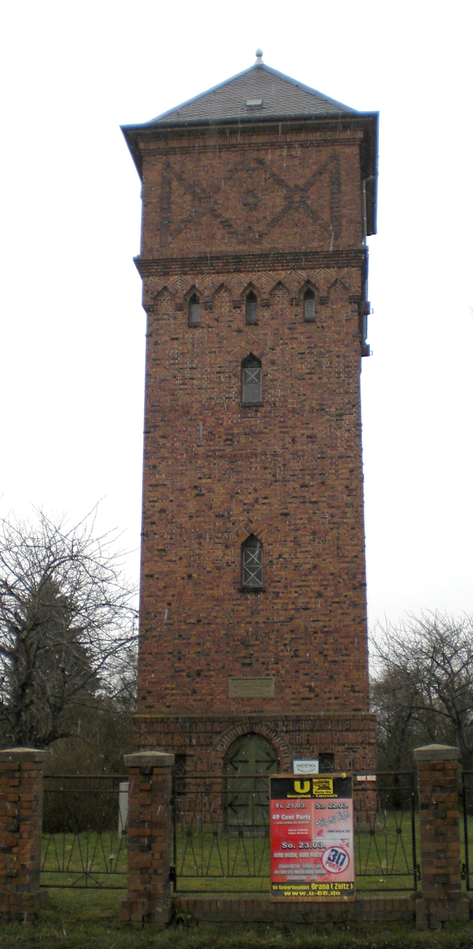 Wasserturm in Stössen, Sachsen-Anhalt